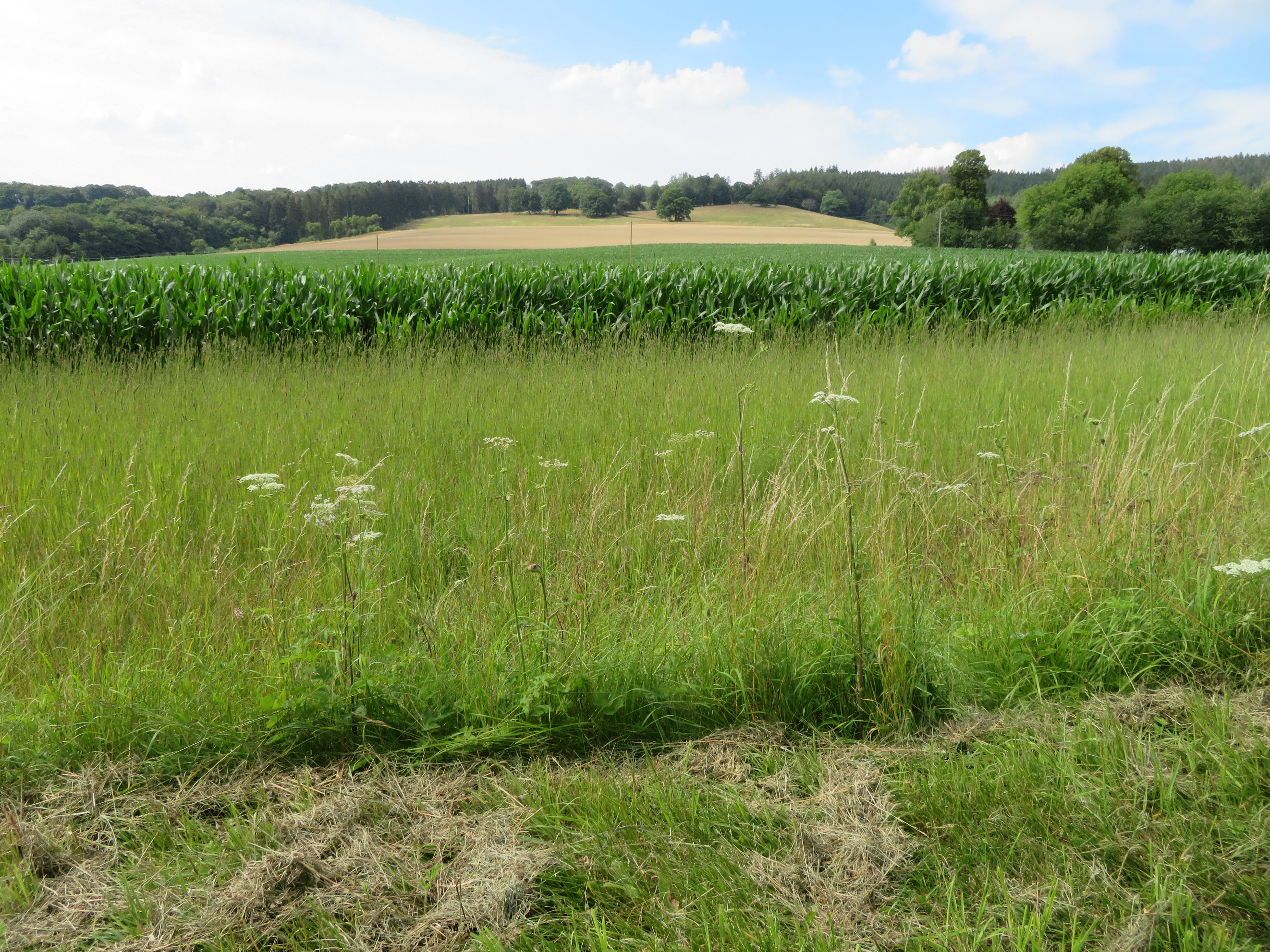 Offenland Teil vom Landschaftsschutzgebiet Hellefelder Senke​ nördlich Steinbruch.